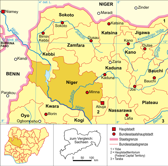 Politische Karte Nigerias (Bundesstaat Niger hervorgehoben)